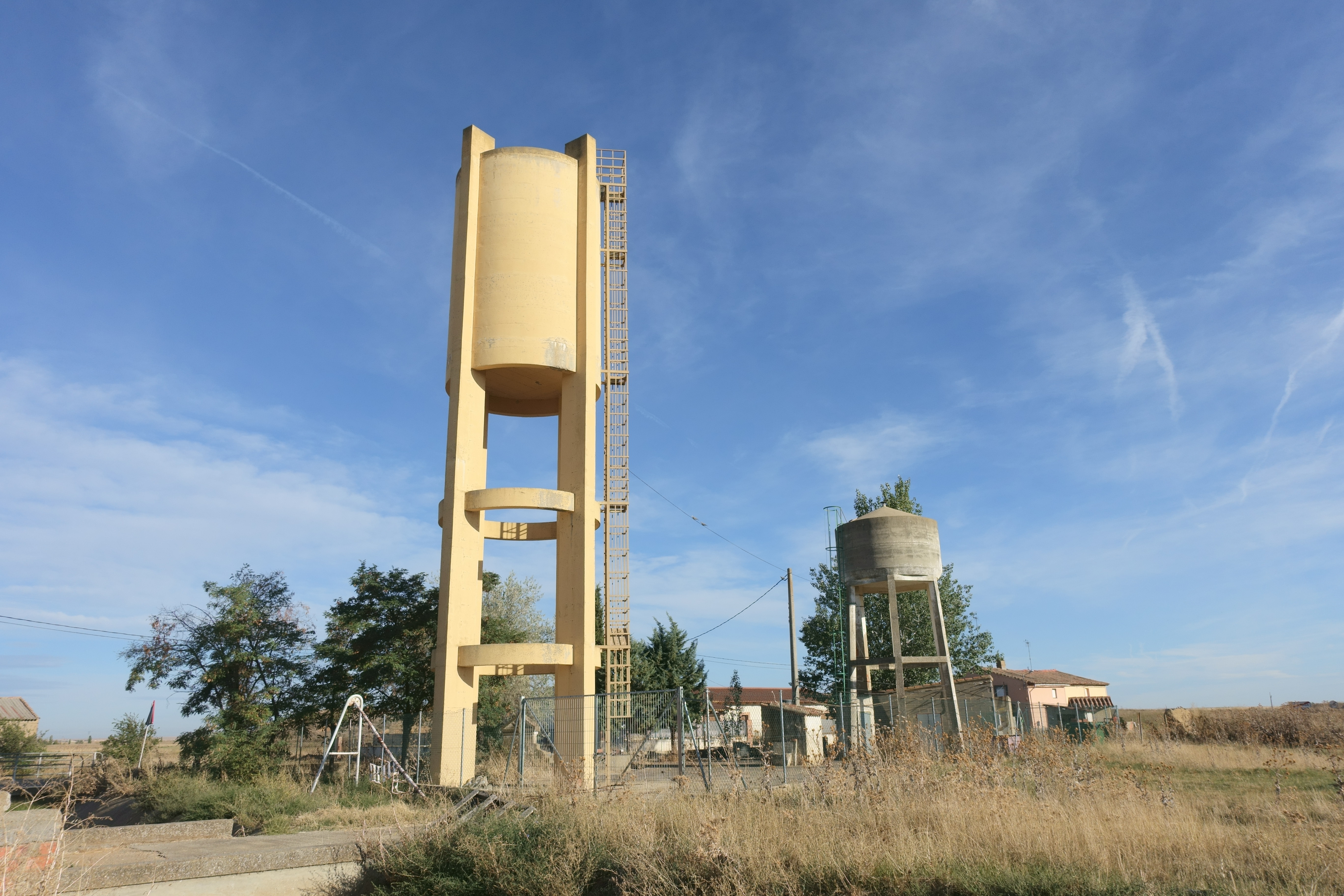 Depósitos en Villárdiga (Zamora, España).